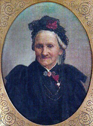 Porträt von Emma Hellenstainer. Obwohl es bereits 1895 ausgestellt wurde, trägt es die Signatur: "F. Behrens. 97. Meran"